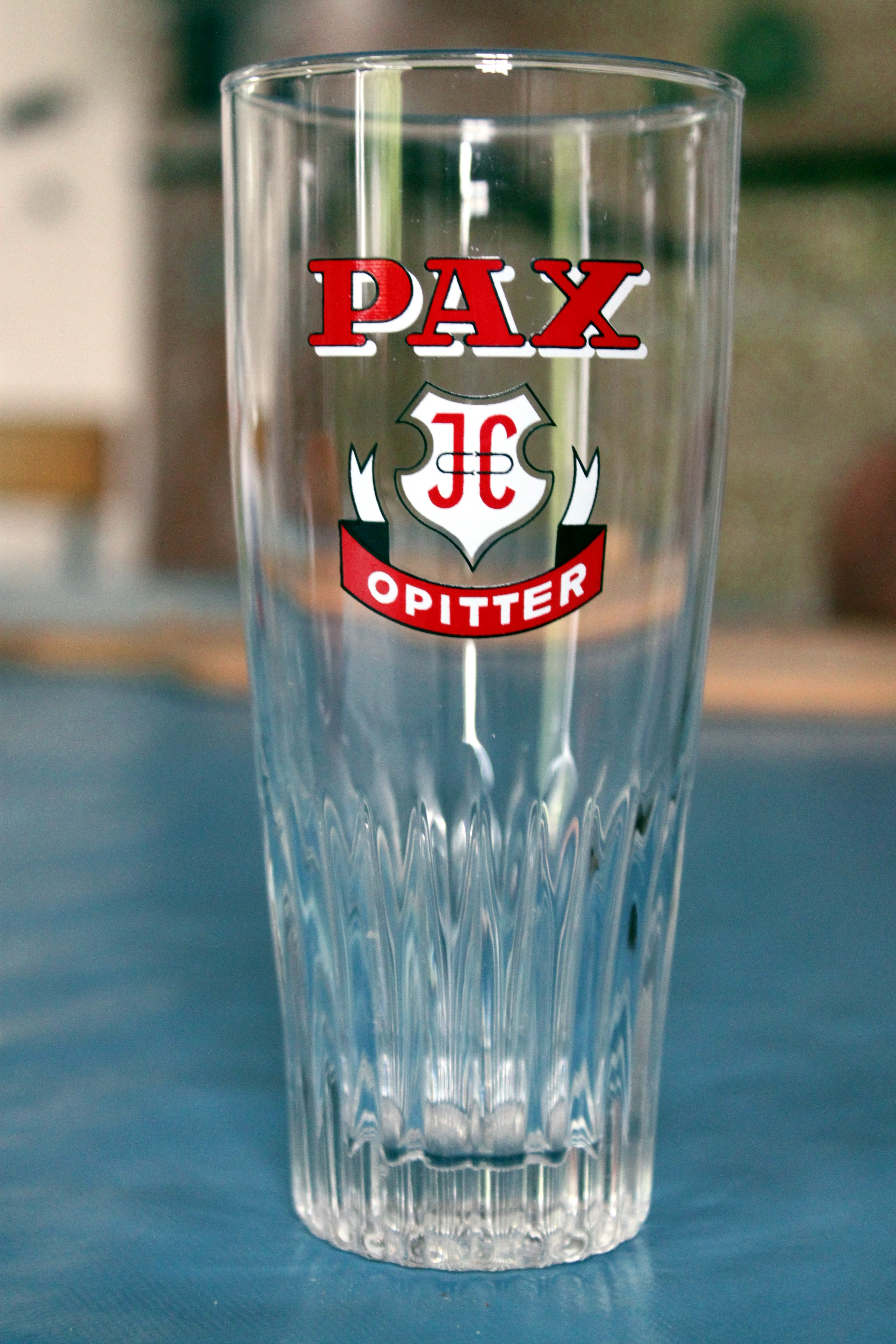 Old pilsner glass Belgian style